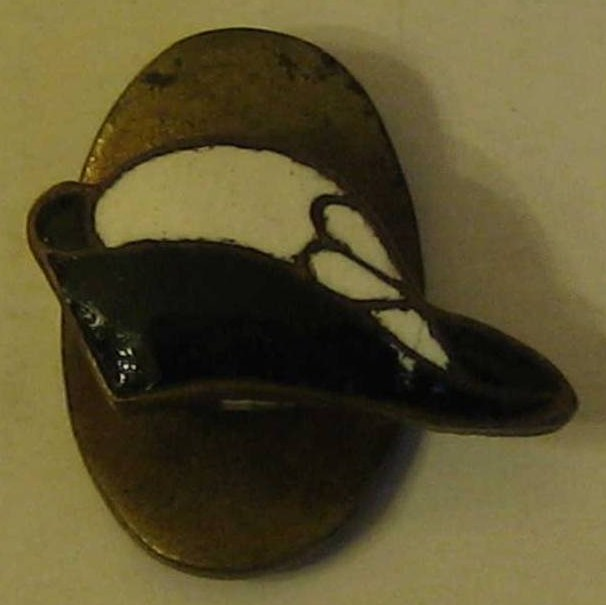 Insigne goliardique : feluca blanc et noire.